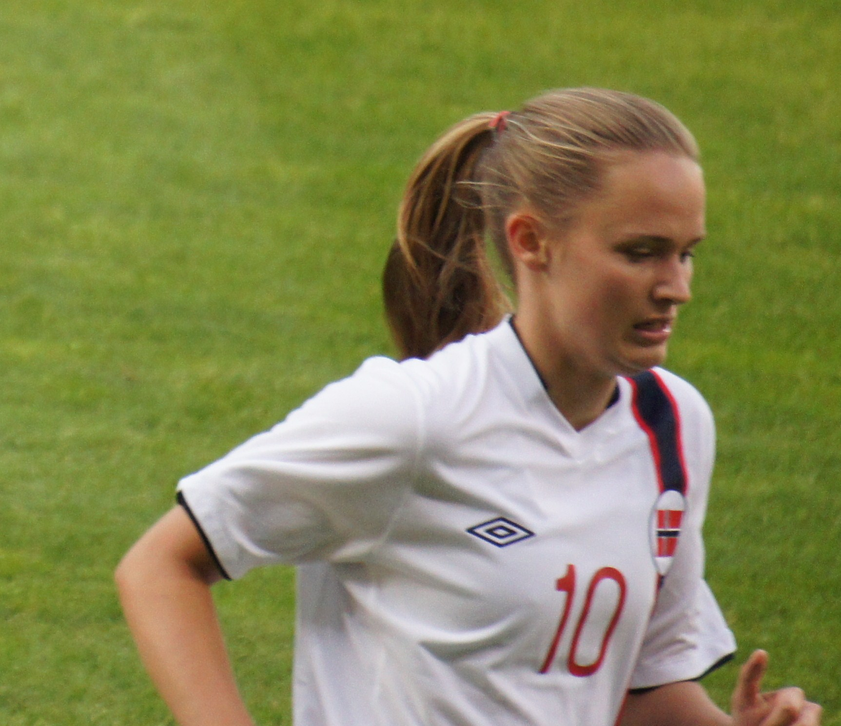 Caroline Graham Hansen En équipe de Norvège.